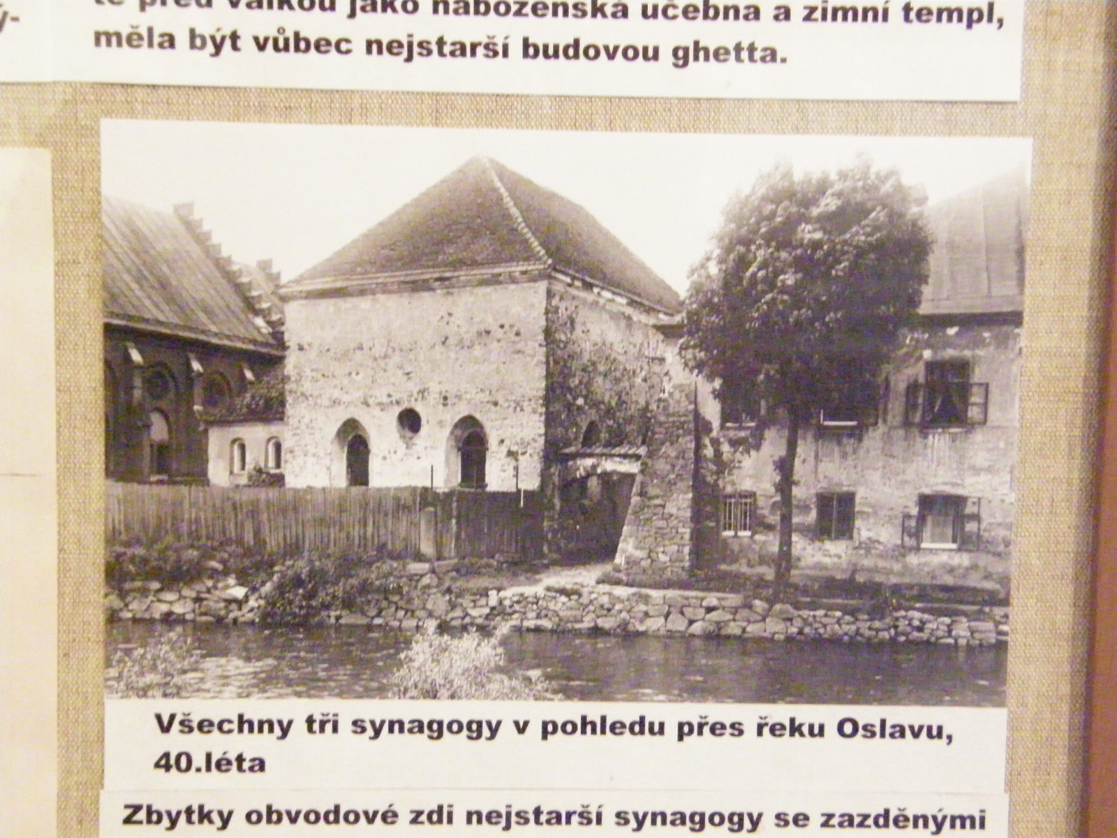 detail z výstavy popisující tři synagogy